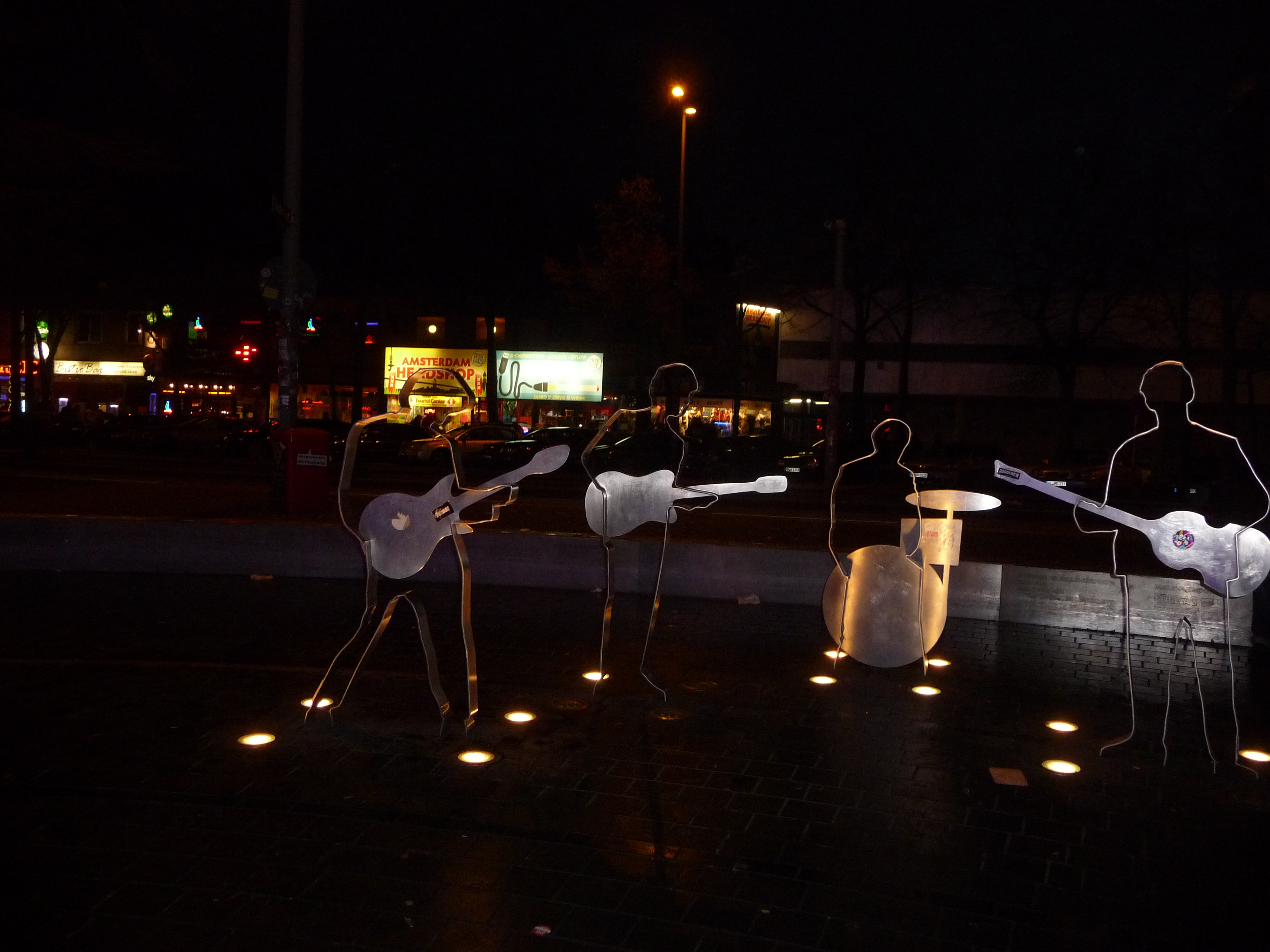 Vier der fünf Figuren auf dem Beatles-Platz in Hamburg-St. Pauli in Deutschland